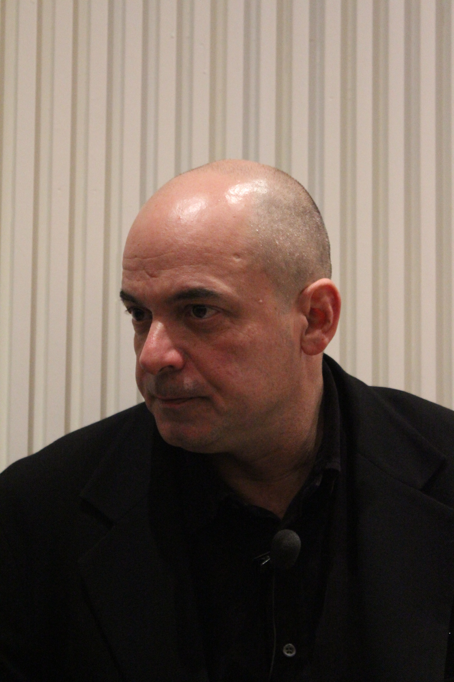 Murat Tabanlıoğlu, Bilkent Üniversitesi Tasarım ve Mimarlık Topluluğu'nun düzenlediği TasarımBilkent'teki konferansında.